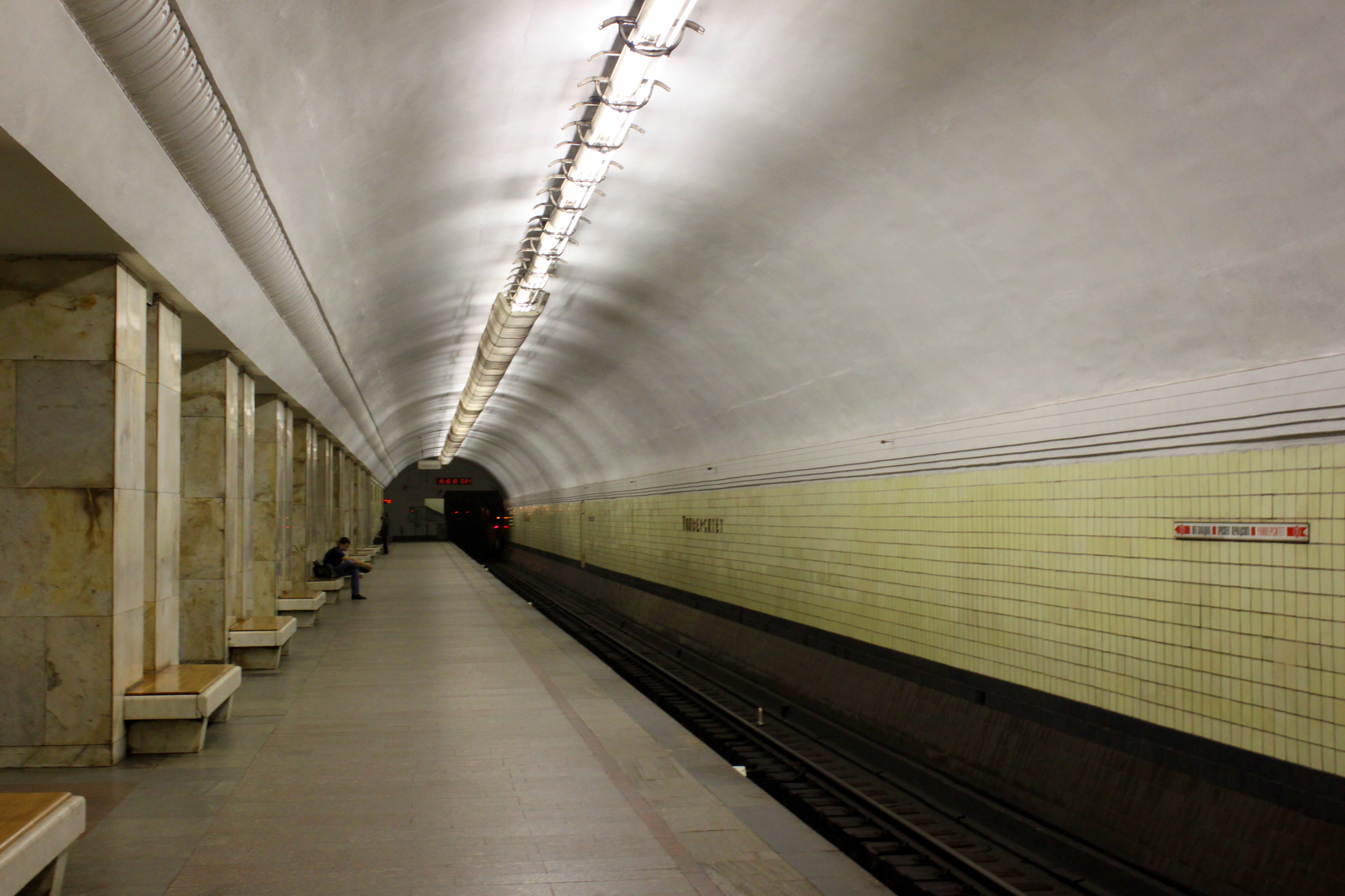 Metrostacio „Universitet“ (Universitato) en Moskvo